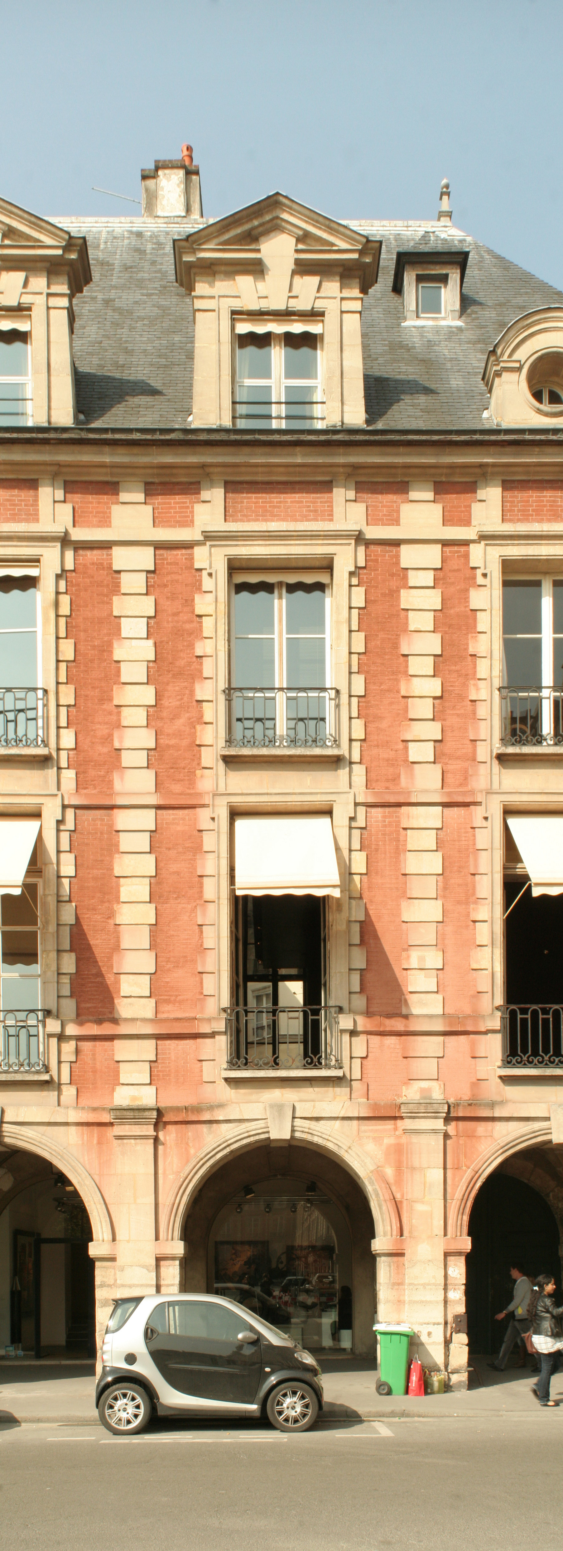 Une travée de façade du 24 place des Vosges, 75003 Paris.